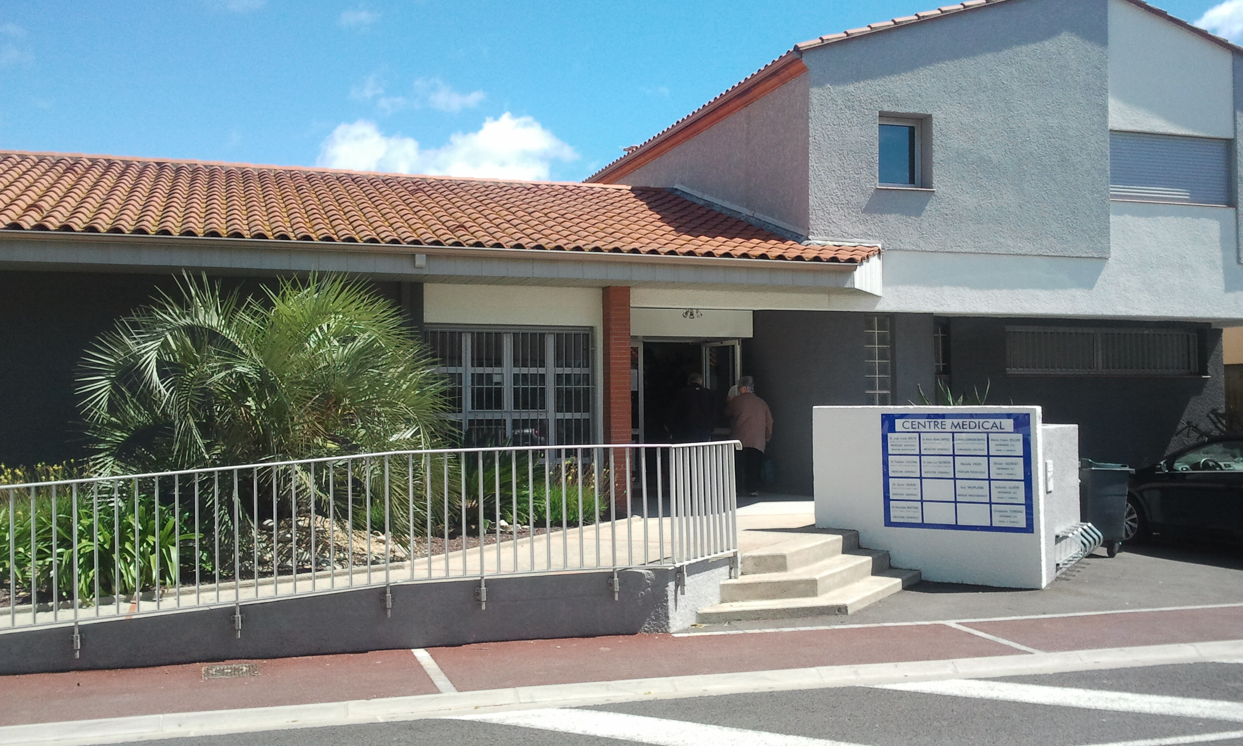 Centre médical de Sainte-Marie